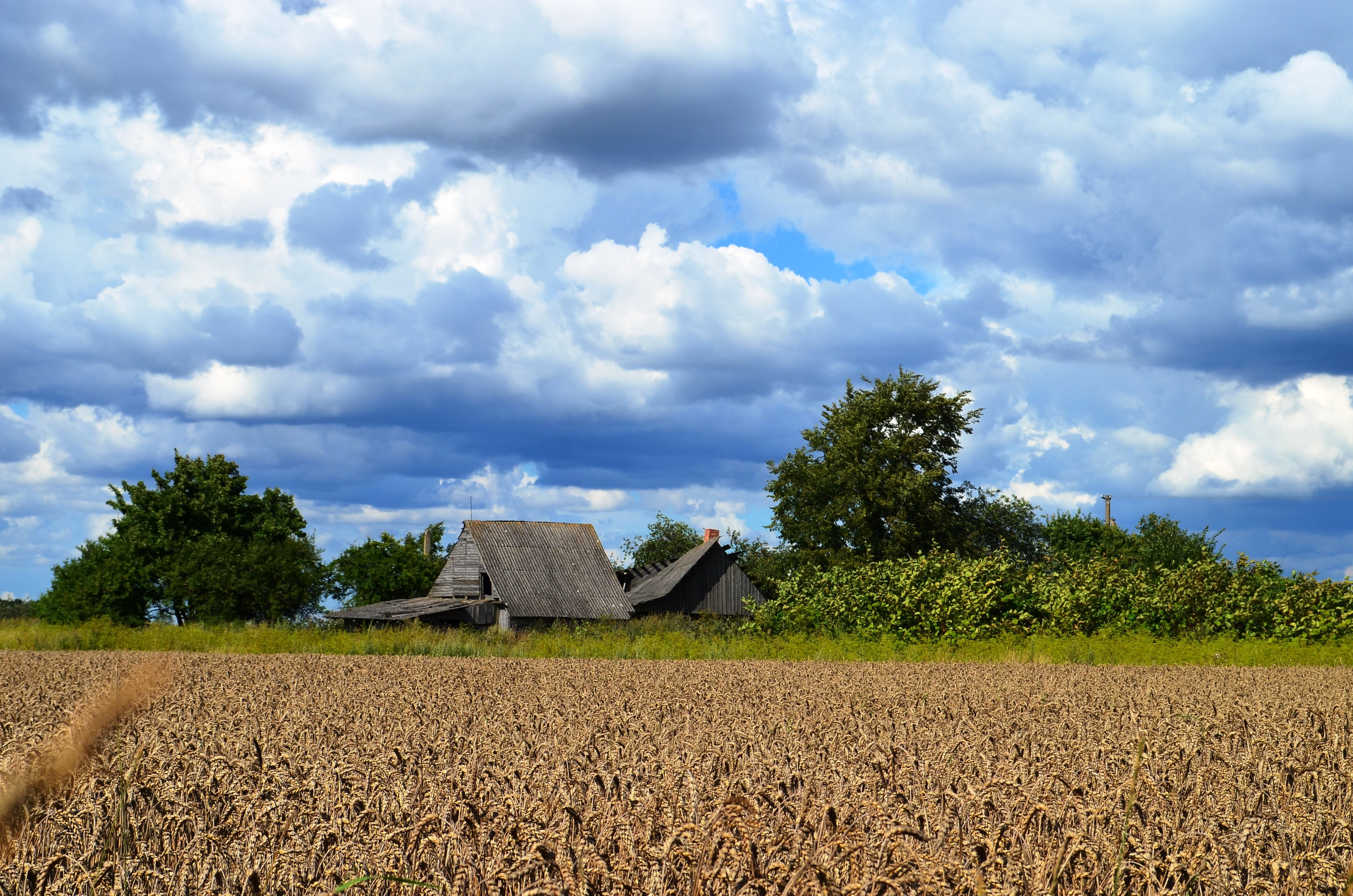 Vasariškiai, Kėdainių raj.